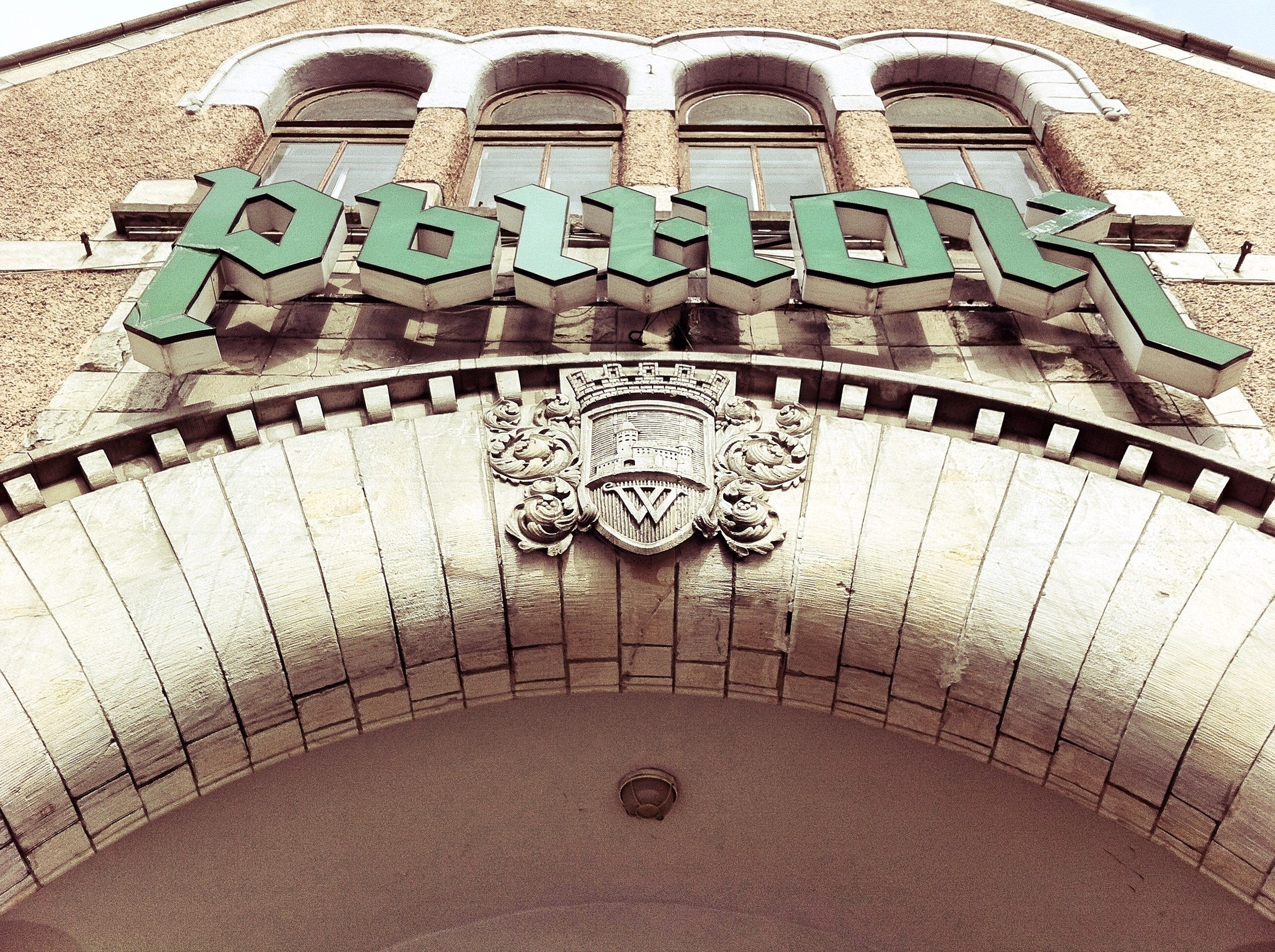 Здание рынка (Санкт-Петербург и Лен.область, Выборг, северный вал, 4)